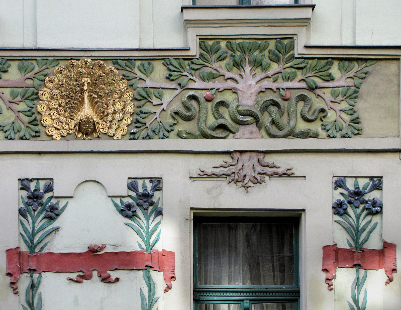 Ház (Budapest 6, Izabella utca 94.)